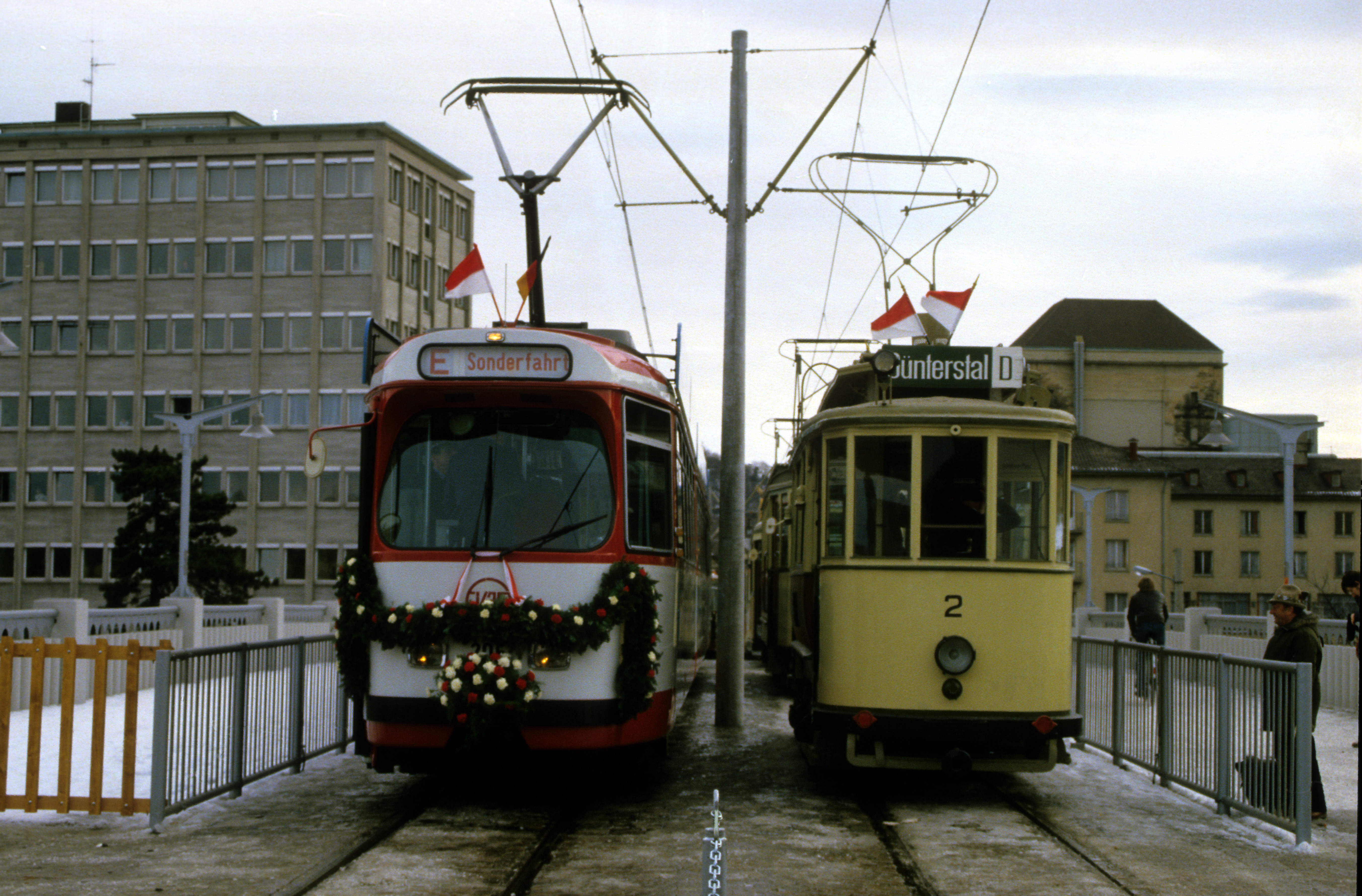 Feierliche Eröffnung der neuen Stadtbahnbrücke über das Bahnhofsgelände mit seinerzeit neuem GT 8 und einem sogenannten „Hobel“